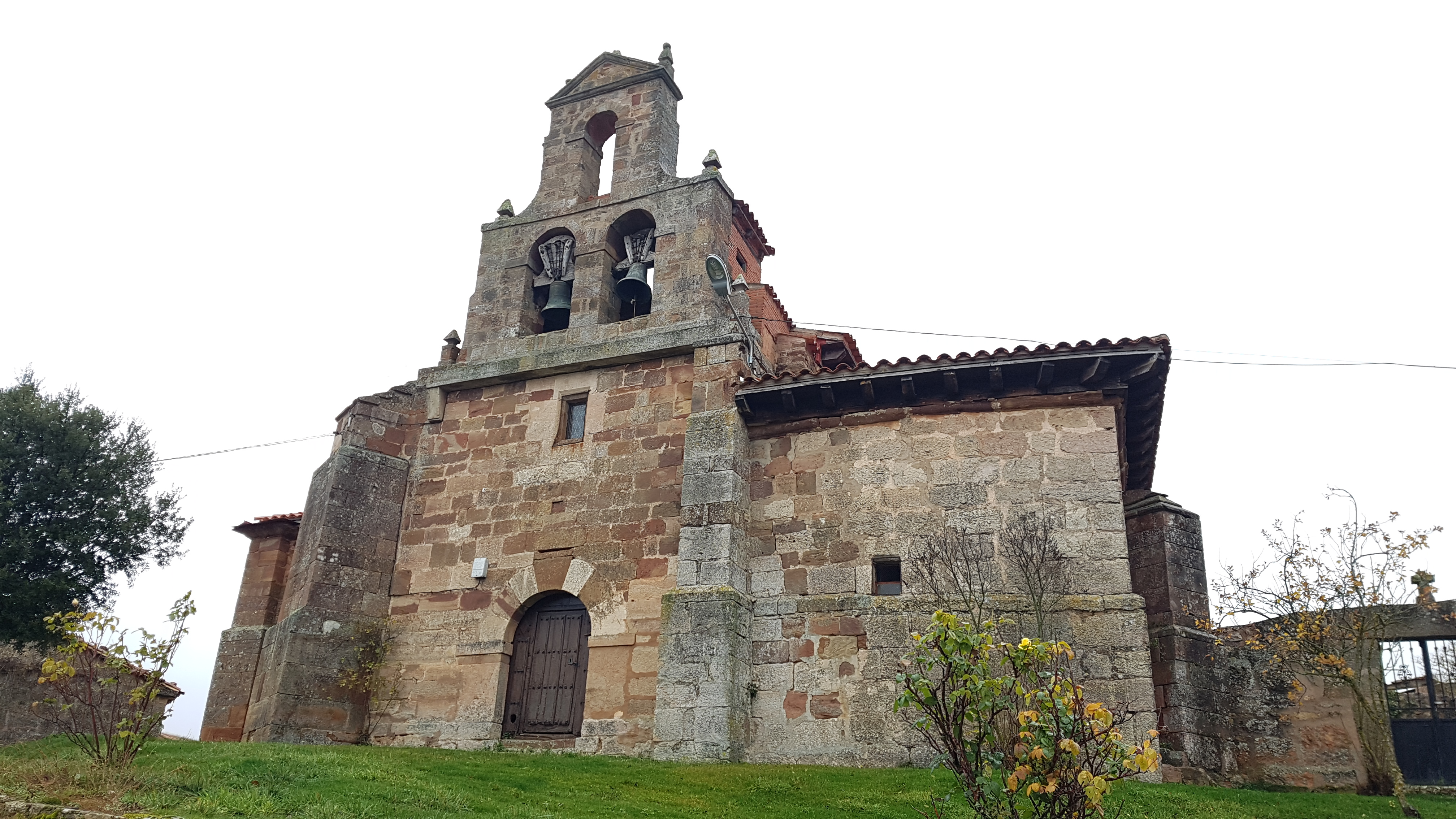 Fachada principal de la iglesia de Mozoncillo de Juarros (Burgos-España)